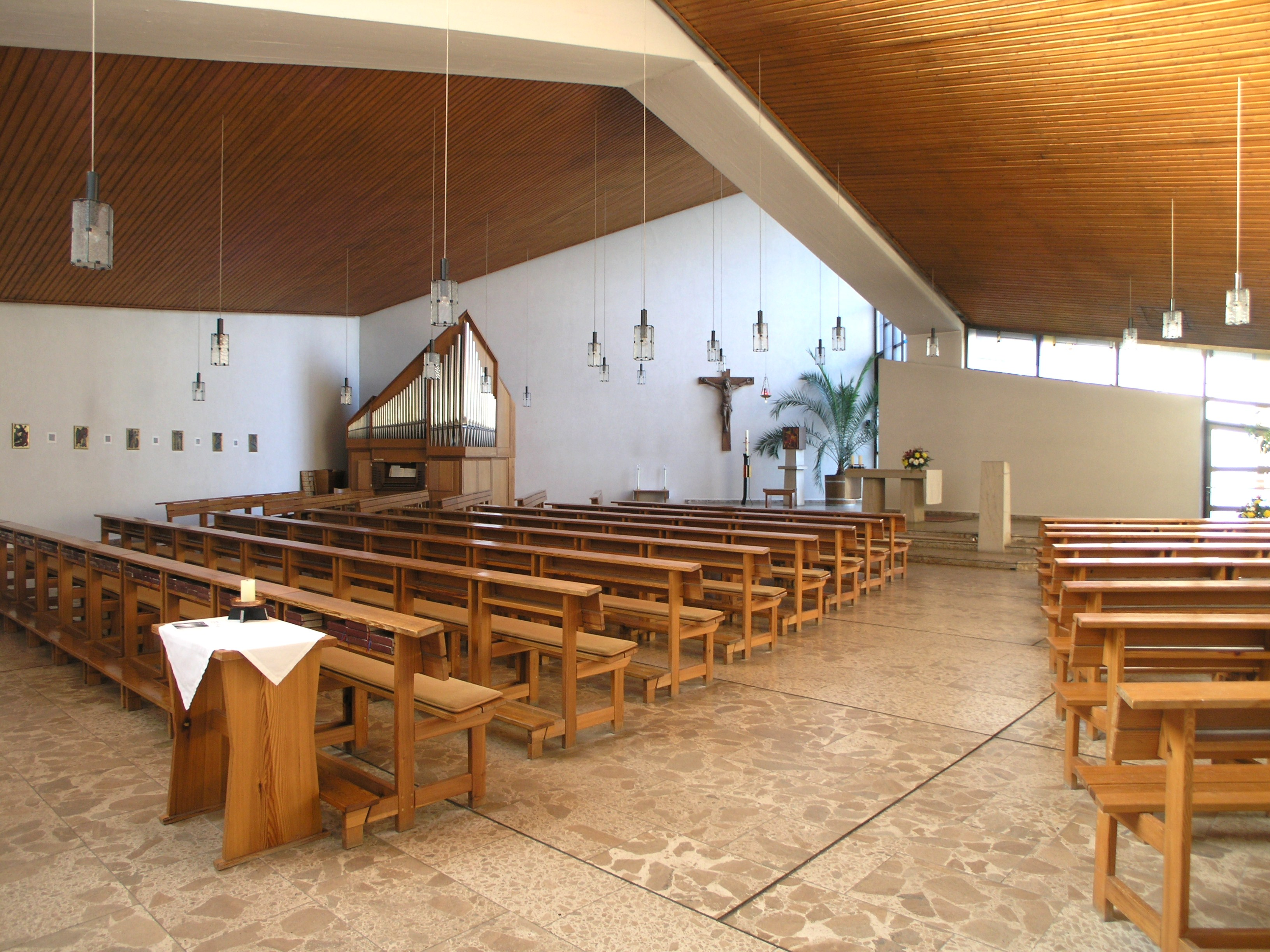 Der Innenraum der Kirche Zum Guten Hirten